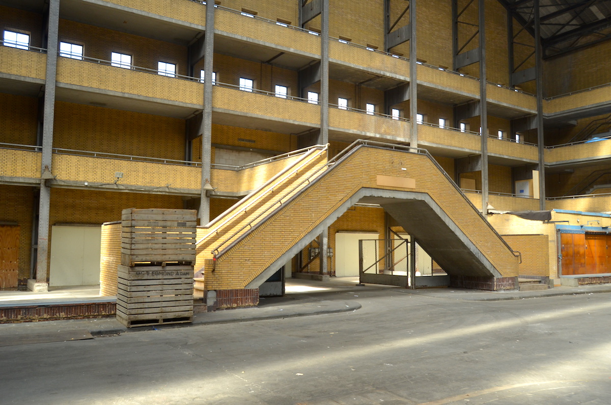 Centrale Markthal te Amsterdam-West - interieur (3); juni 2019. Foto: Erik Swierstra.